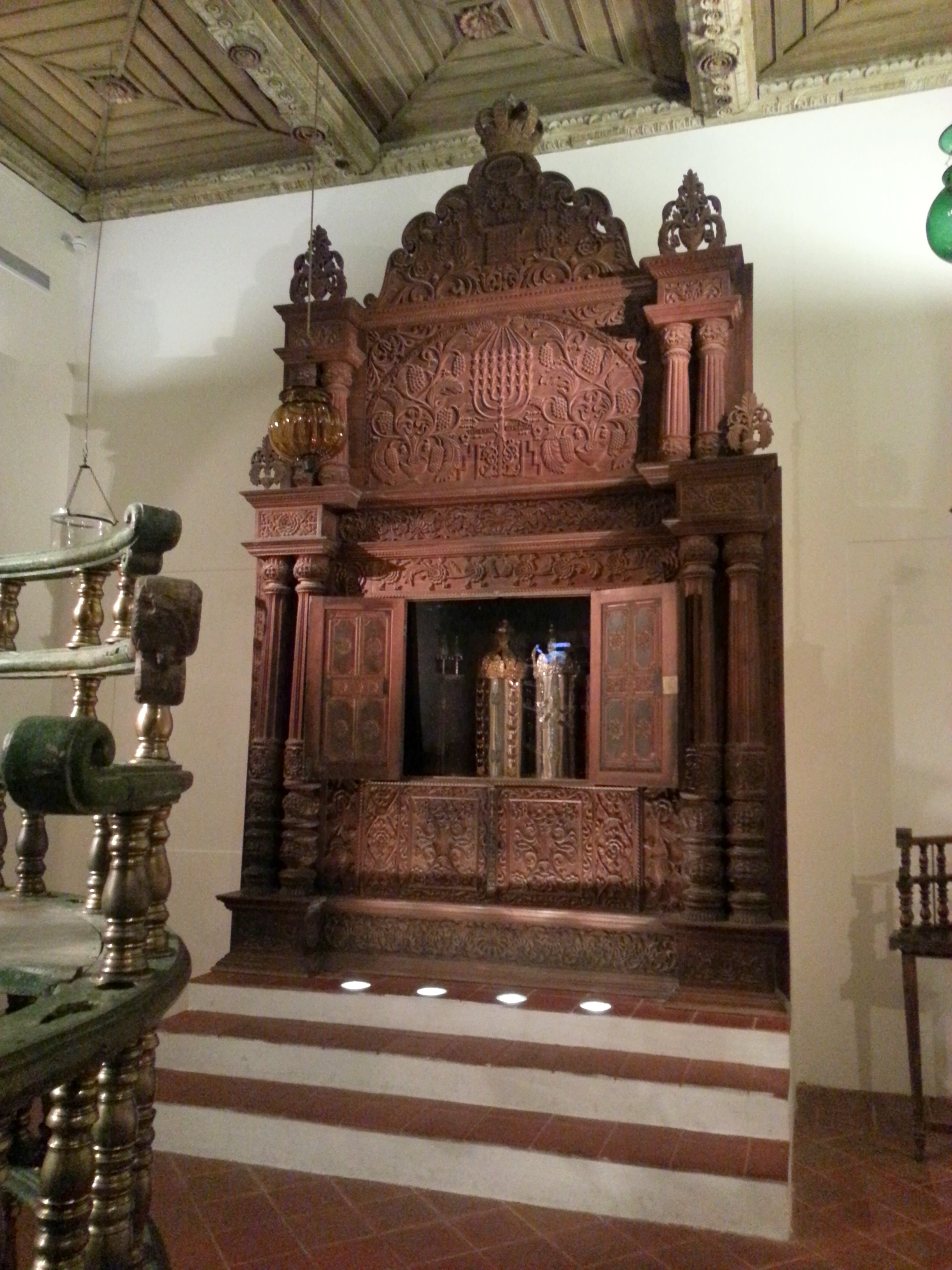 פריטים מבתי כנסת בהודו מוצגים במוזאון ישראל בירושלים